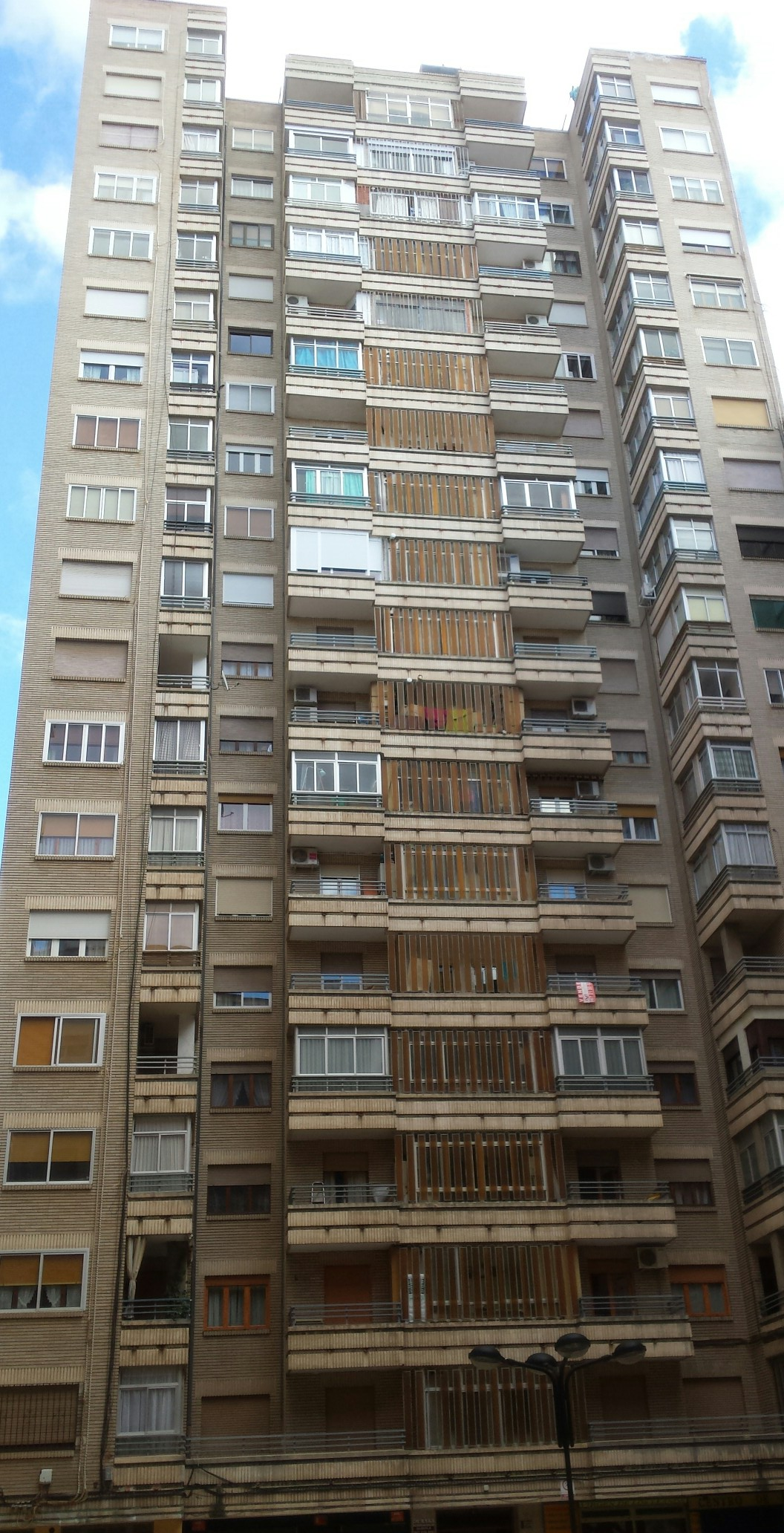 Torre Las Pajaritas